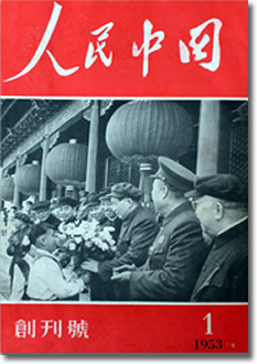 《人民中国》杂志创刊号